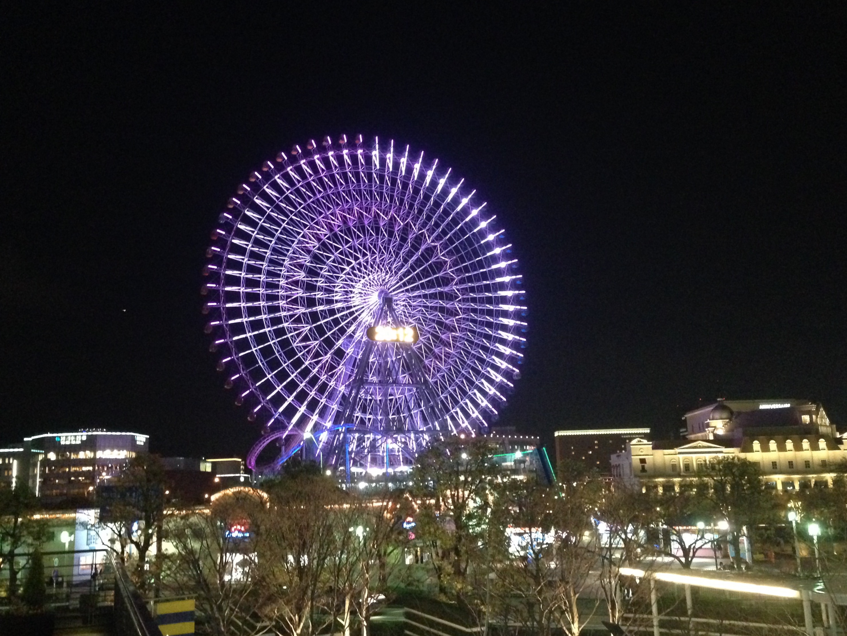 2016年3月にリニューアルされた、横浜みなとみらいにある大観覧車「コスモクロック21」のフルカラーLEDライトアップ（通常時）。